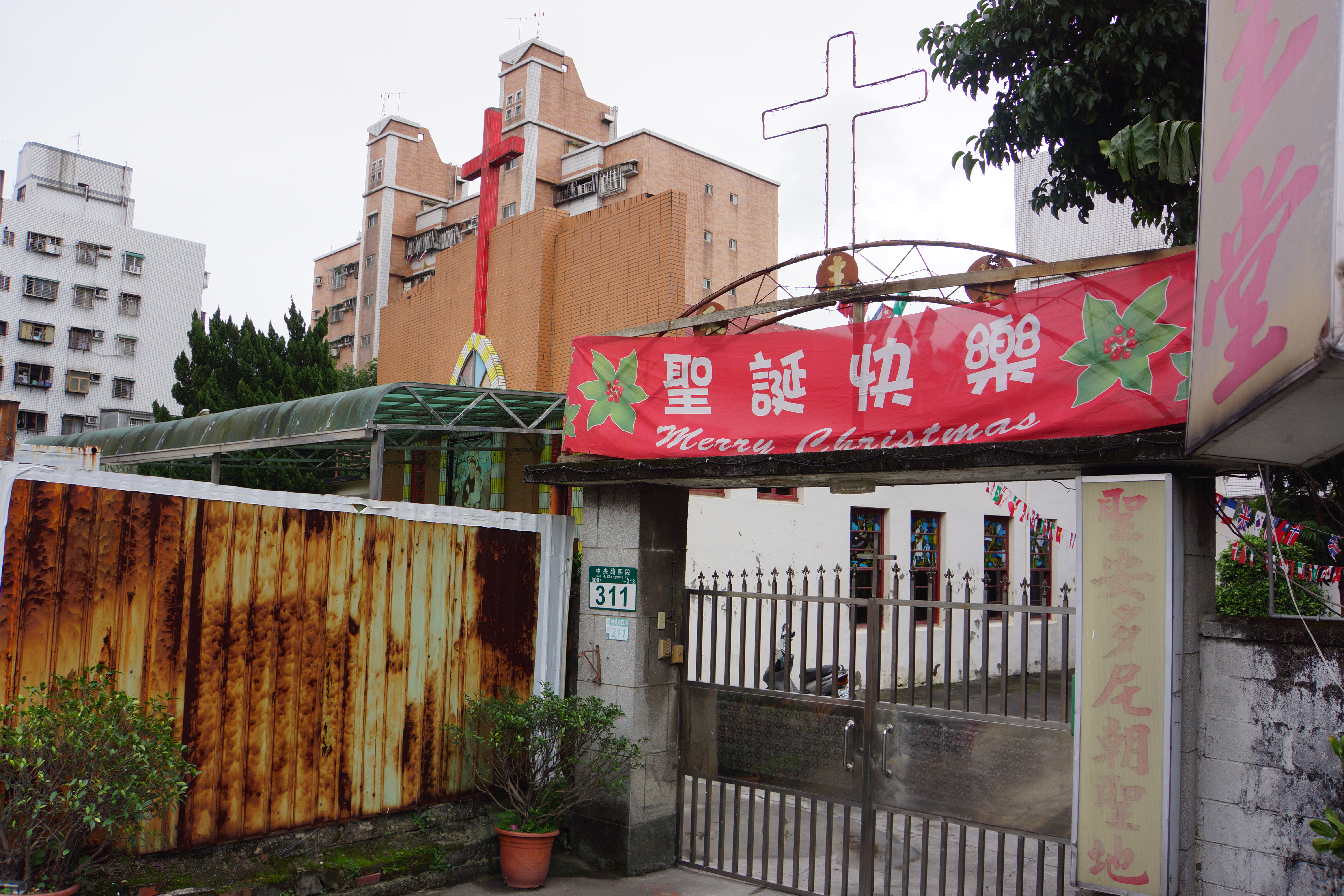 天主教台北總教區土城聖安多尼朝聖地